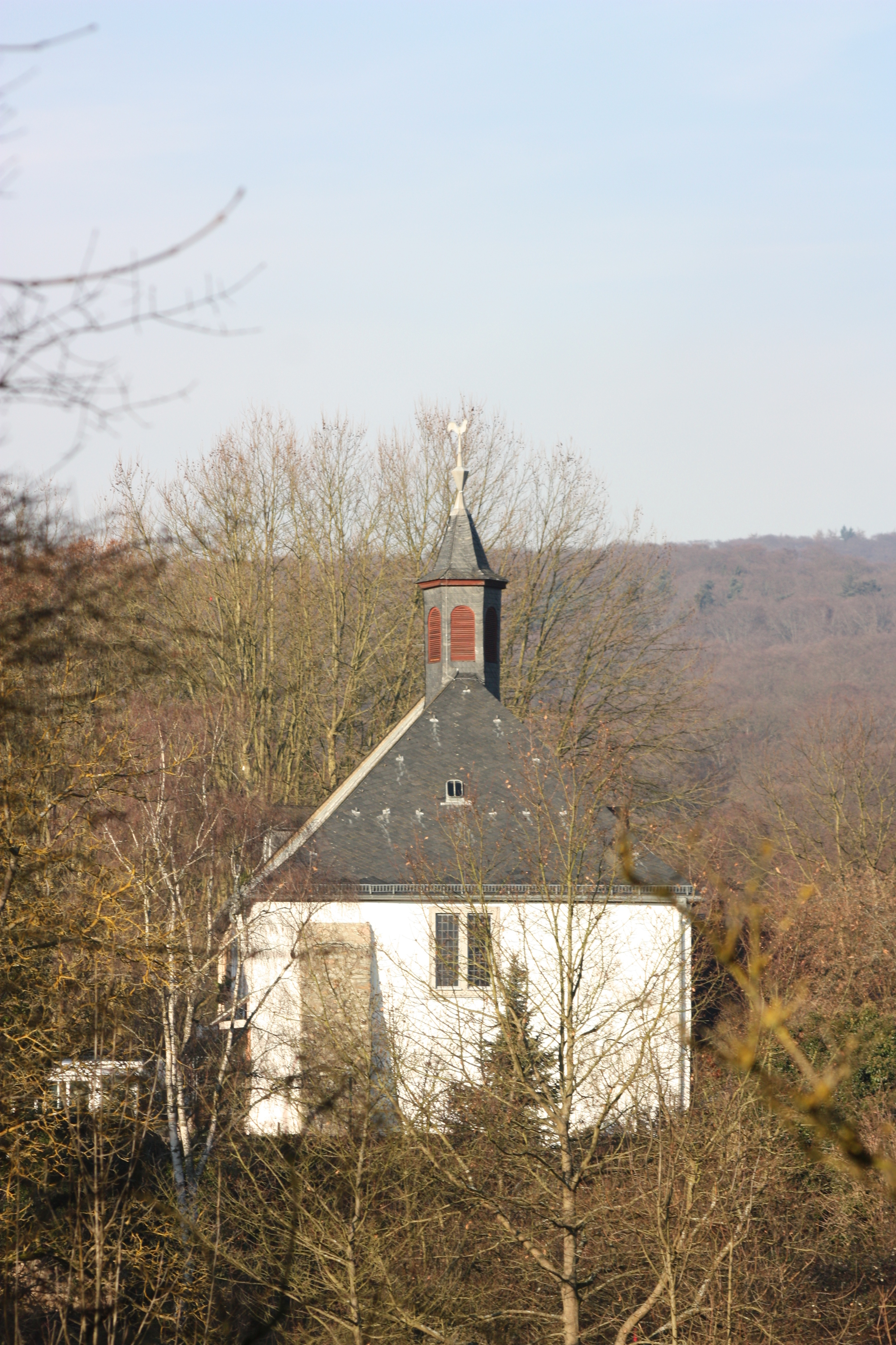 Wiesbaden: Evangelische Kirche am Hofgut Kloster Klarental; Teil des ehemaligen Klosters